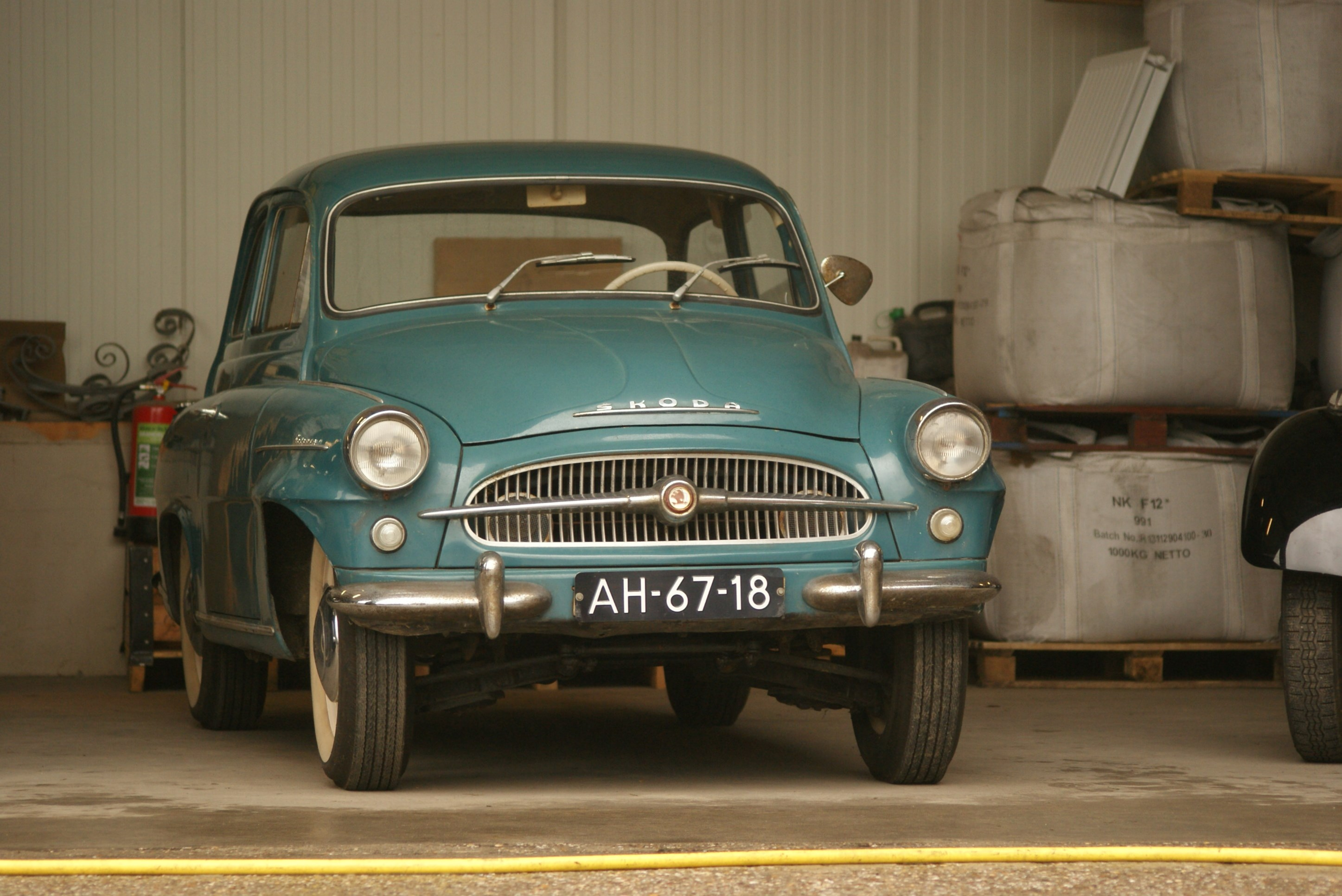 AH-67-18 Oldtimerdag Ederveen 2014